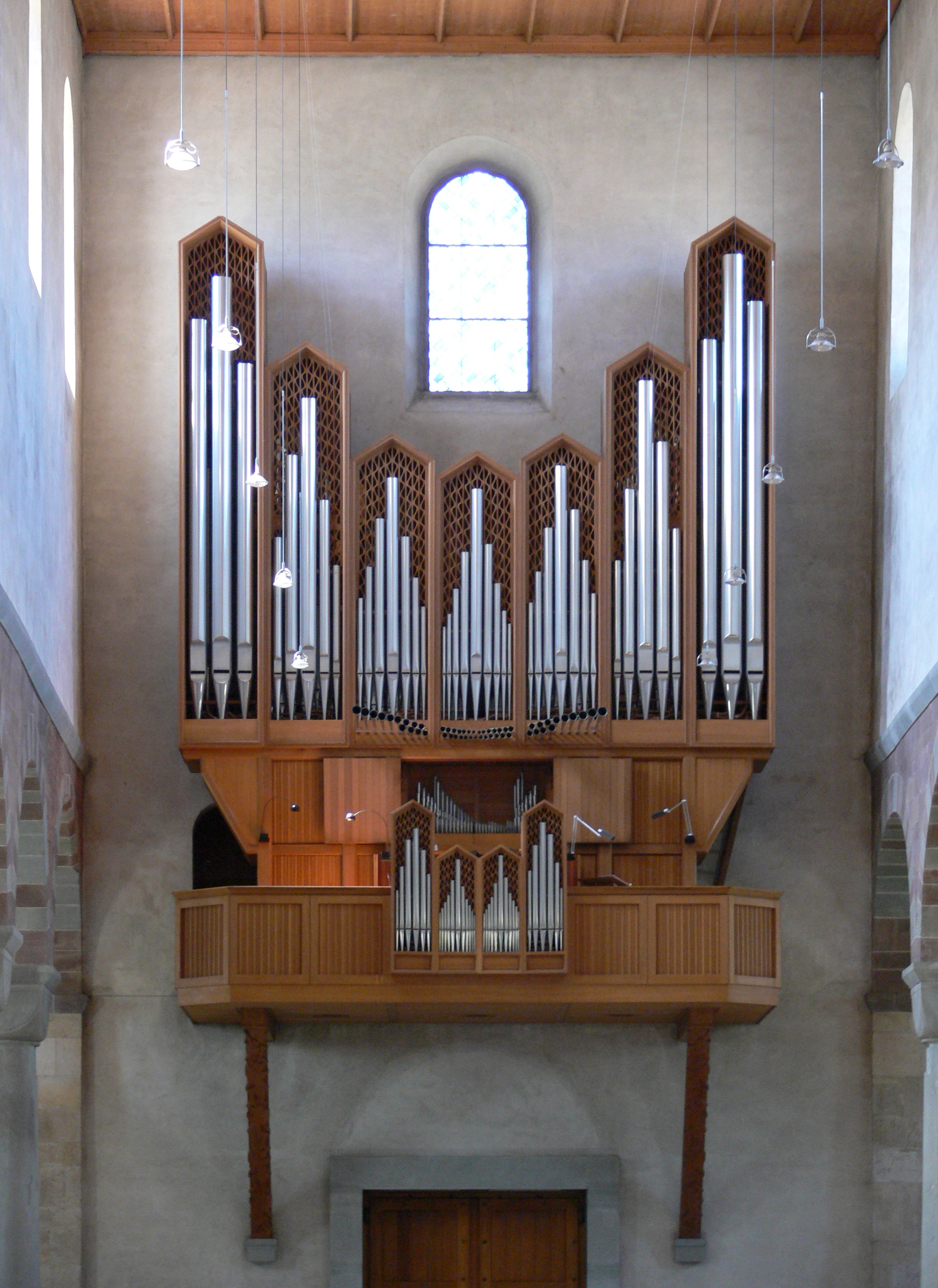 Schaffhausen, Münster, Hauptorgel, von Metzler, 1956-1958, op. 279